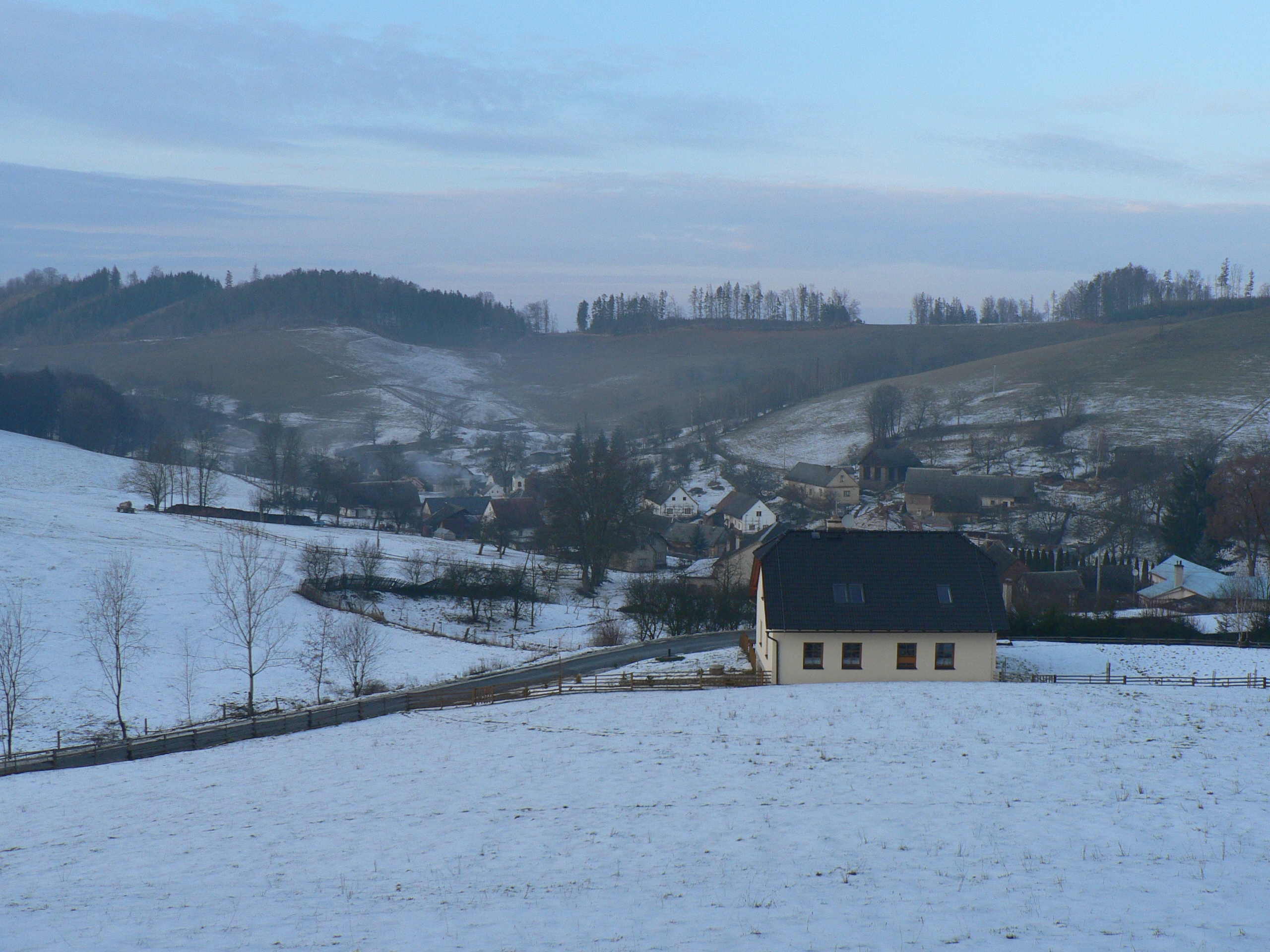 Pohled na obec Strupšín od jihu.